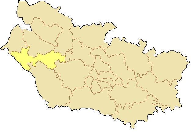 Canton de Gamaches dans le département de la Somme